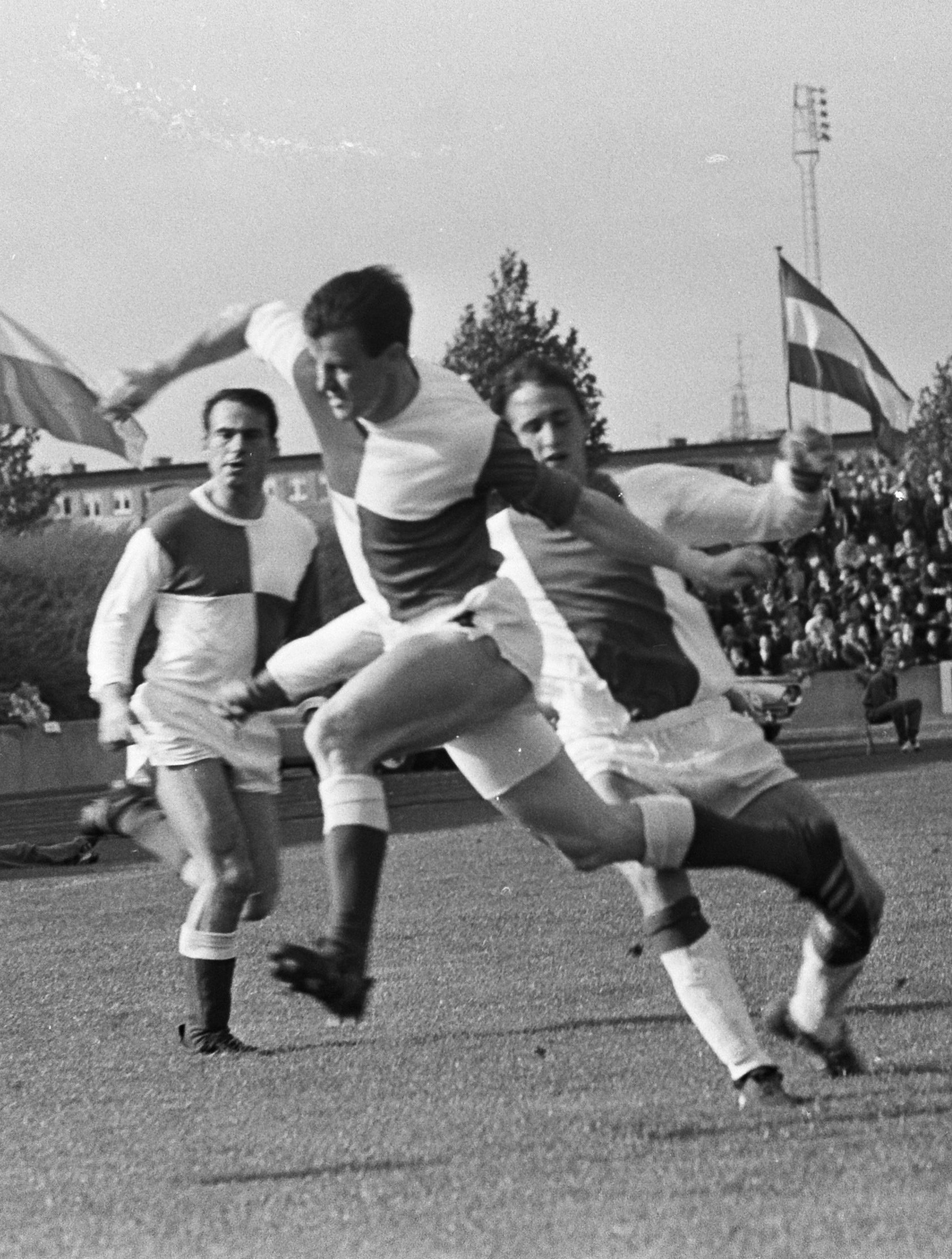 Collectie / Archief : Fotocollectie Anefo Reportage / Serie : [ onbekend ] Beschrijving : MVV tegen Ajax 0-4. Cruijff in duel met Quadackers Datum : 1 oktober 1967 Trefwoorden : sport, voetbal Persoonsnaam : Cruijff, Johan Fotograaf : Nijs, Jac. de / Anefo Auteursrechthebbende : Nationaal Archief Materiaalsoort : Negatief (zwart/wit) Nummer archiefinventaris : bekijk toegang 2.24.01.05 Bestanddeelnummer : 920-7475